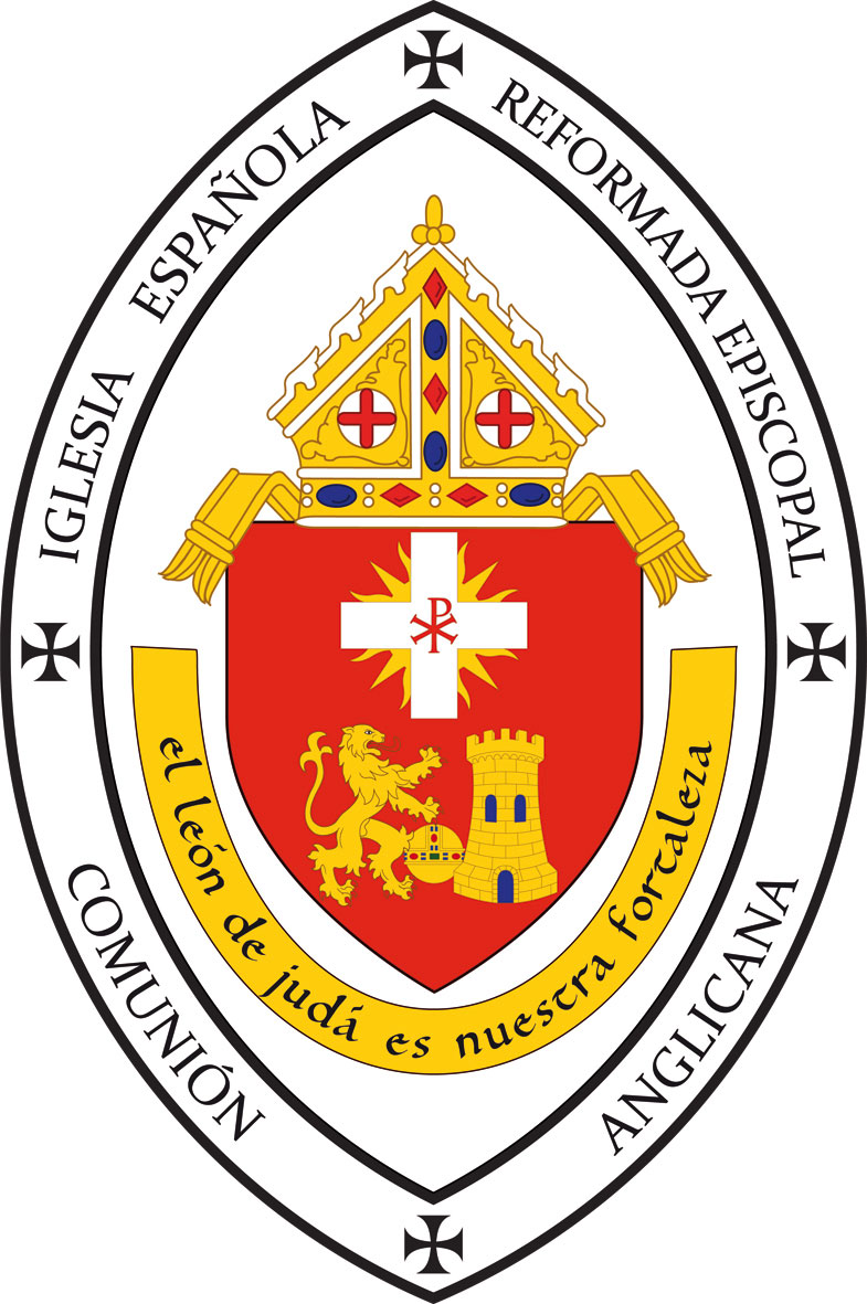 Sello de la Iglesia Española Reformada Episcopal.